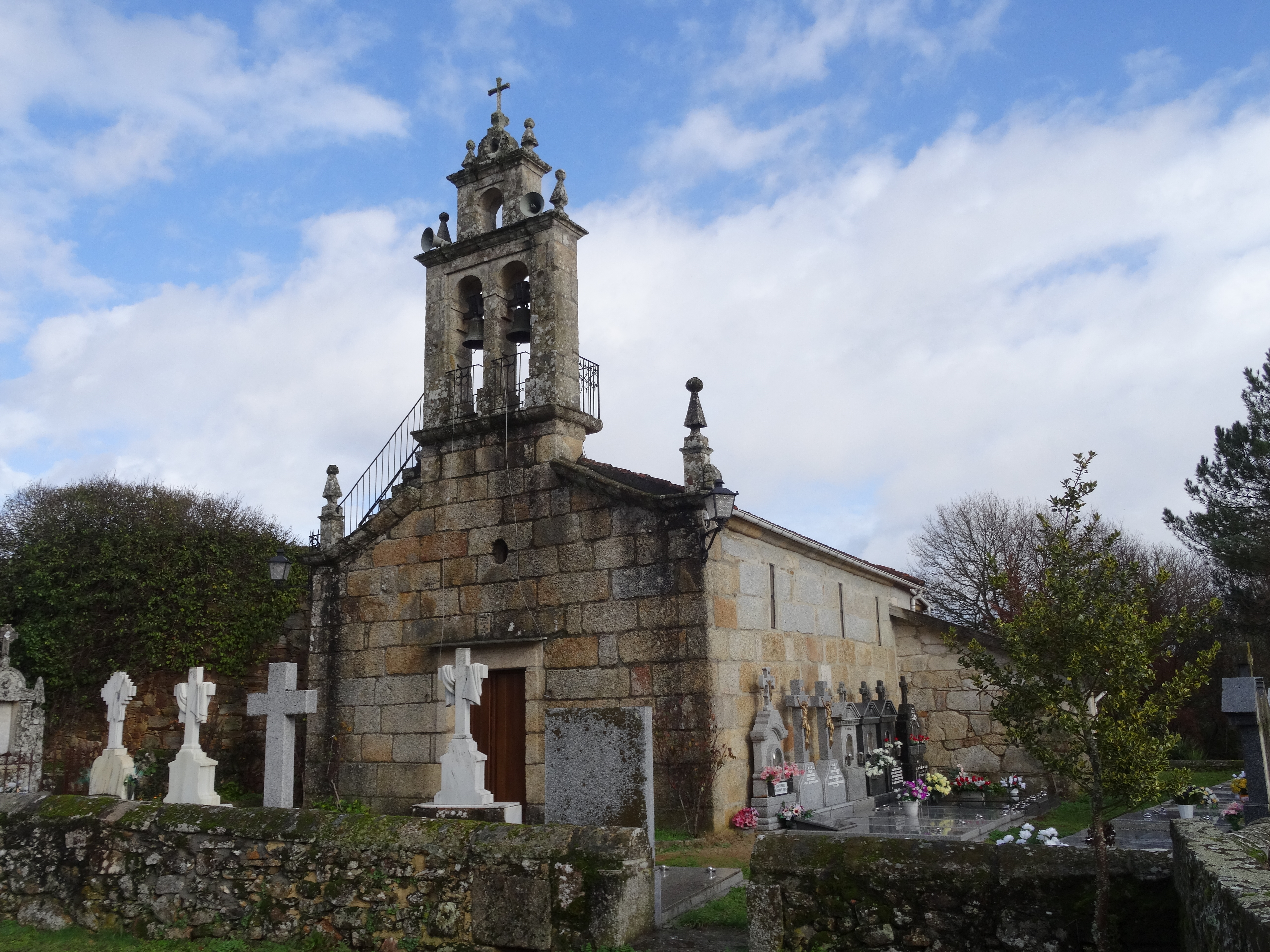 Ver título.